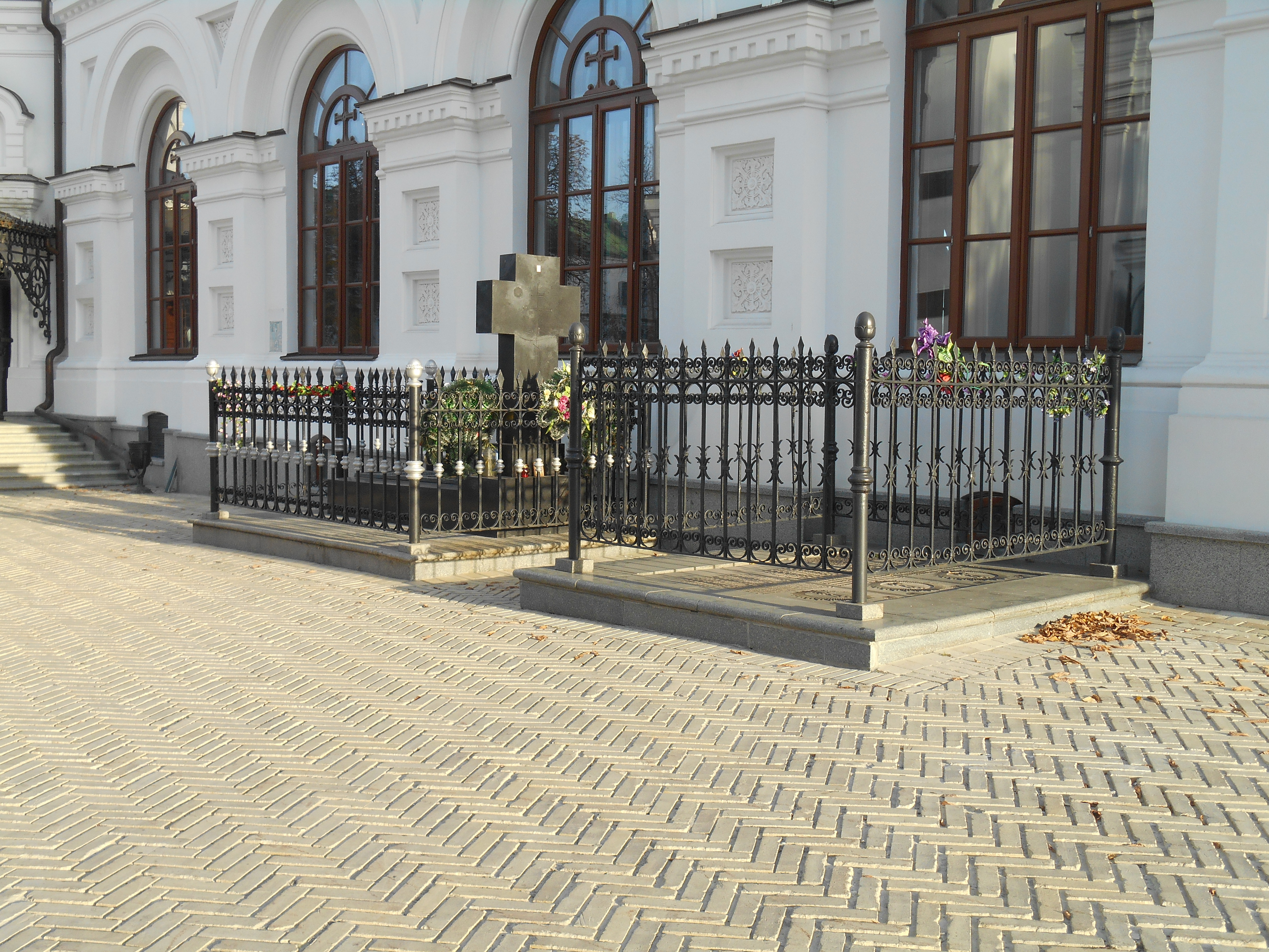 Палата трапезна з церквою Антонія і Феодосія, Київ, Лаврська вул., 9